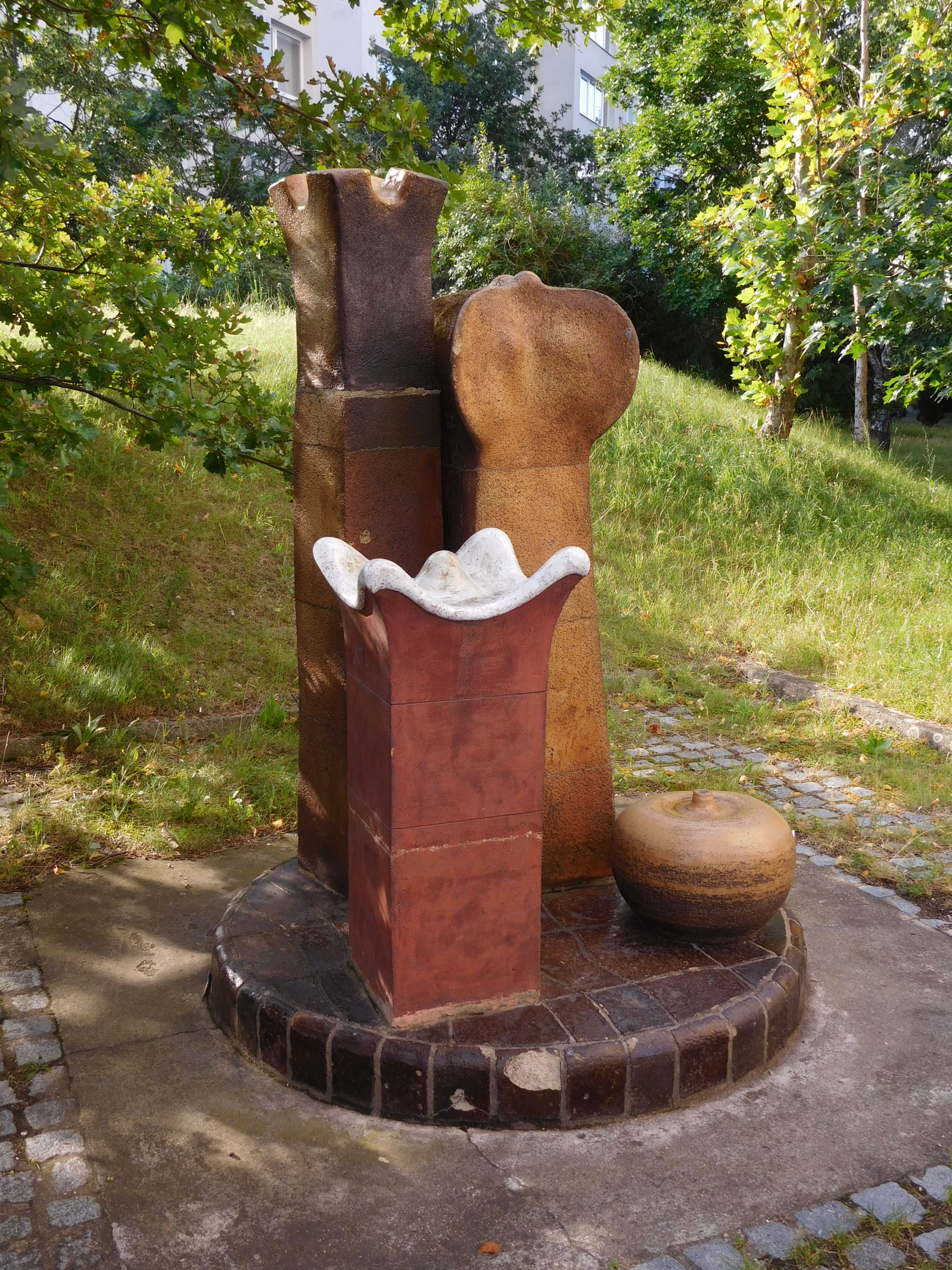 Praha - Háje, Anežky Malé, plastika (Lydie Hladíková, Děvana Mírová, Marie Rychlíková, 80. léta)